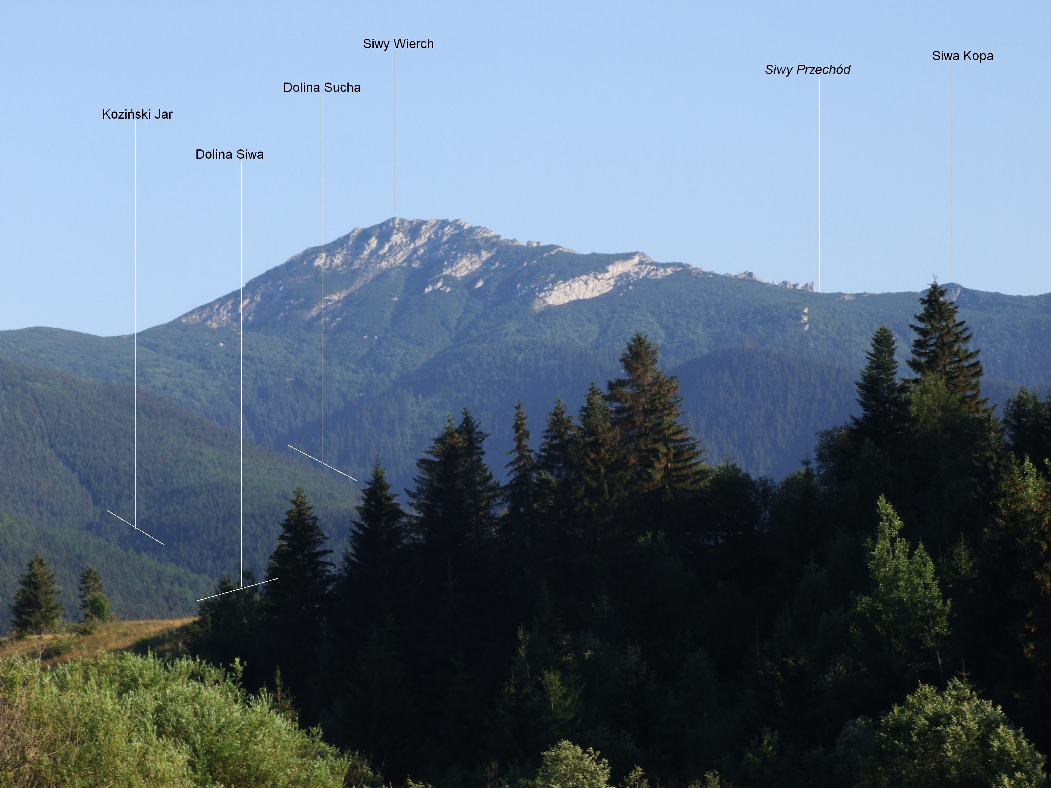 Widok od północnej strony